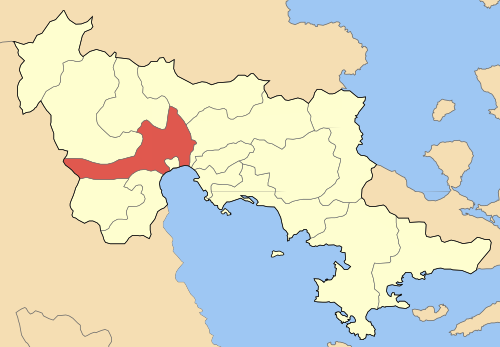 Locator map for Argous municipality (Δήμος Άργους) at Argolida perfecture, Greece.